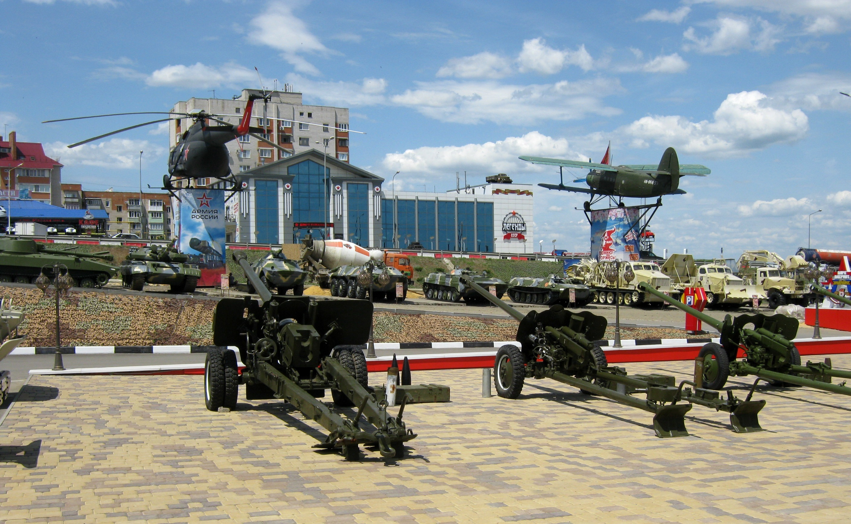 Каменск - парк Патриот 19